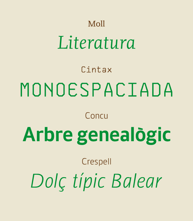 Mostra lletres tipogràfiques Moll, Cintax, Concu, Crespell